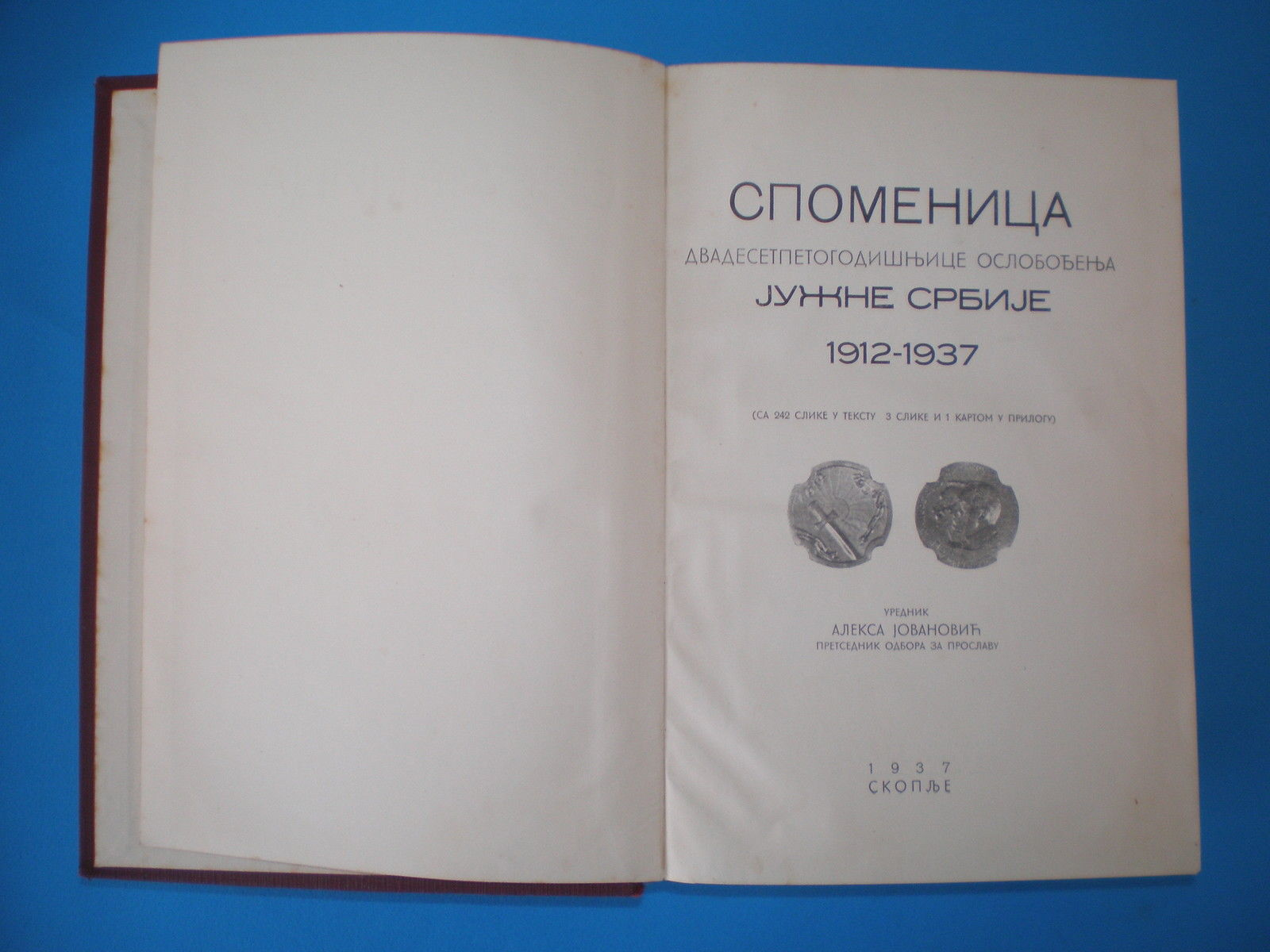 Споменица..., Скопље, 1937.